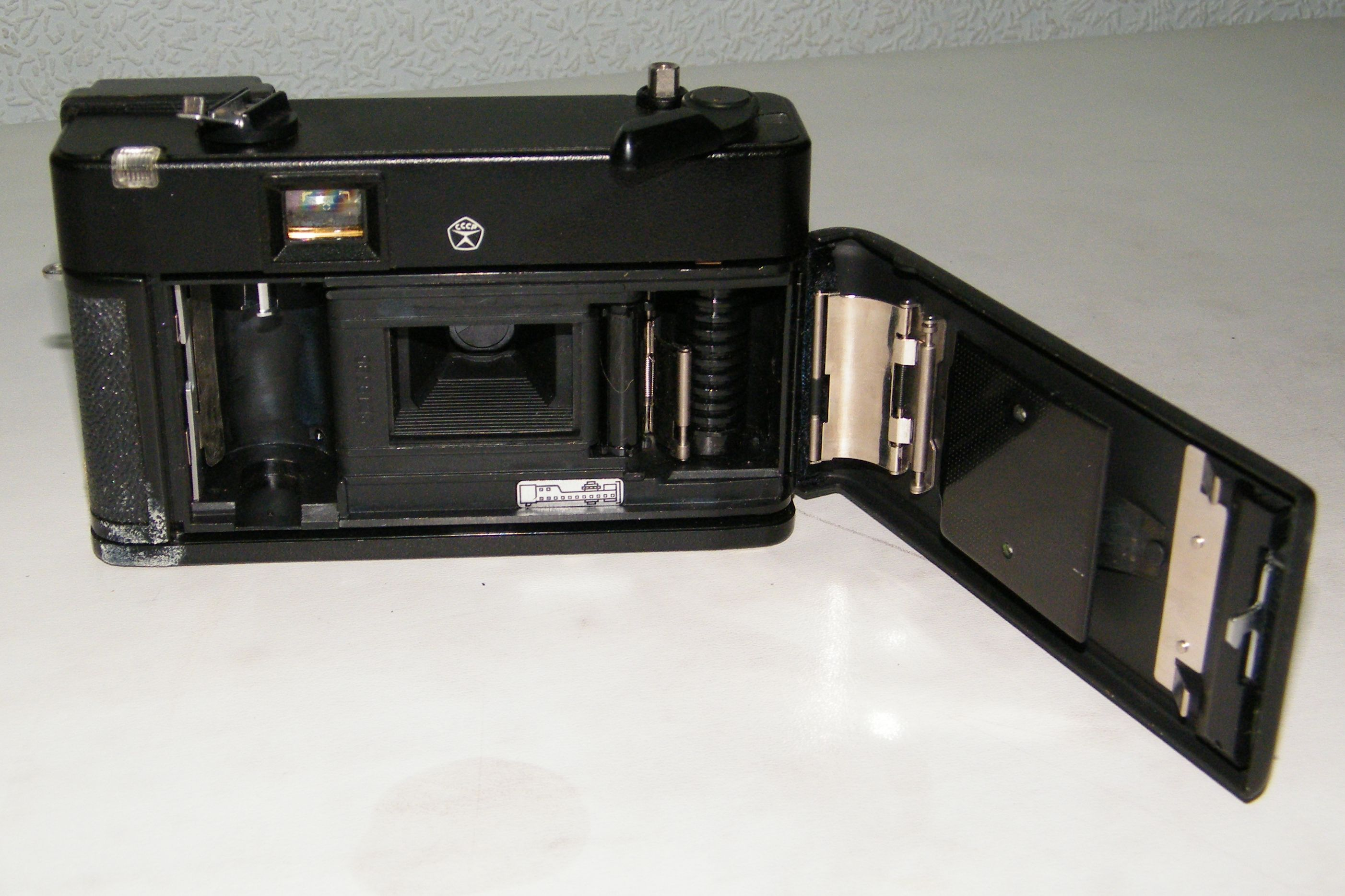 Фотоаппарат "Эликон-автофокус" - первый советский автоматический фотоаппарат с автофокусировкой. БелОМО, Минск, вторая половина 1980-х годов.